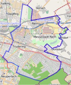 District n°15 Trudering-Riem de Munich (52747) avec les frontieres du district This map may be incomplete, and may contain errors. Don't rely solely on it for navigation.